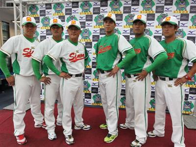 橙果設計興農牛隊新球衣。